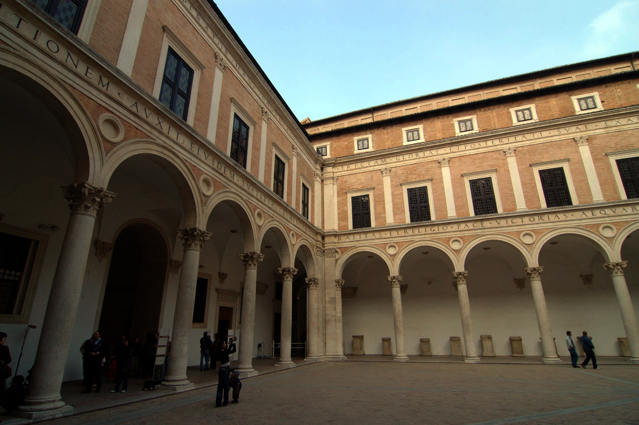 Urbino, Marche, Italia